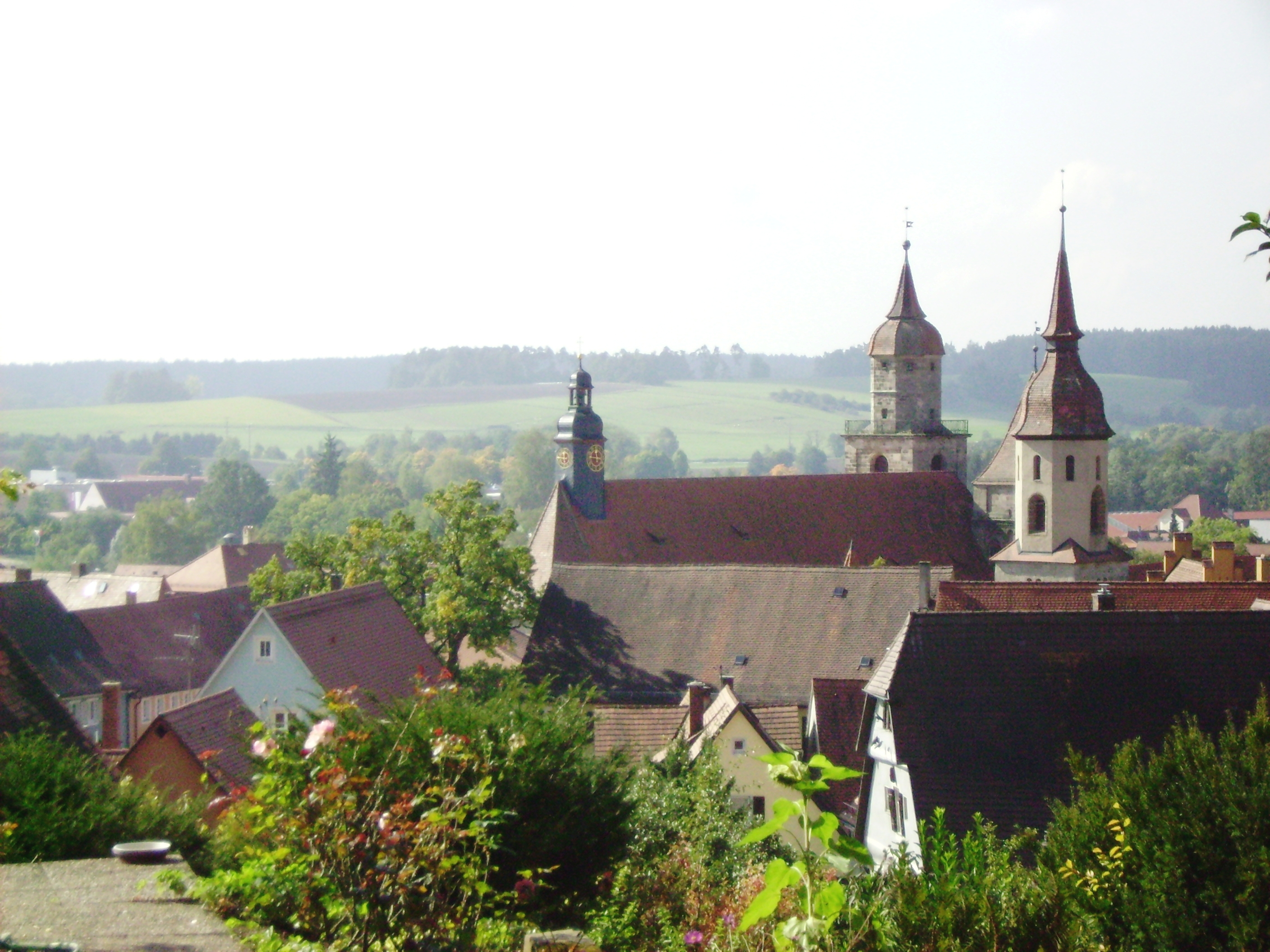 Blick vom Krankenhaus auf die Türme der beiden ev. Kirchen